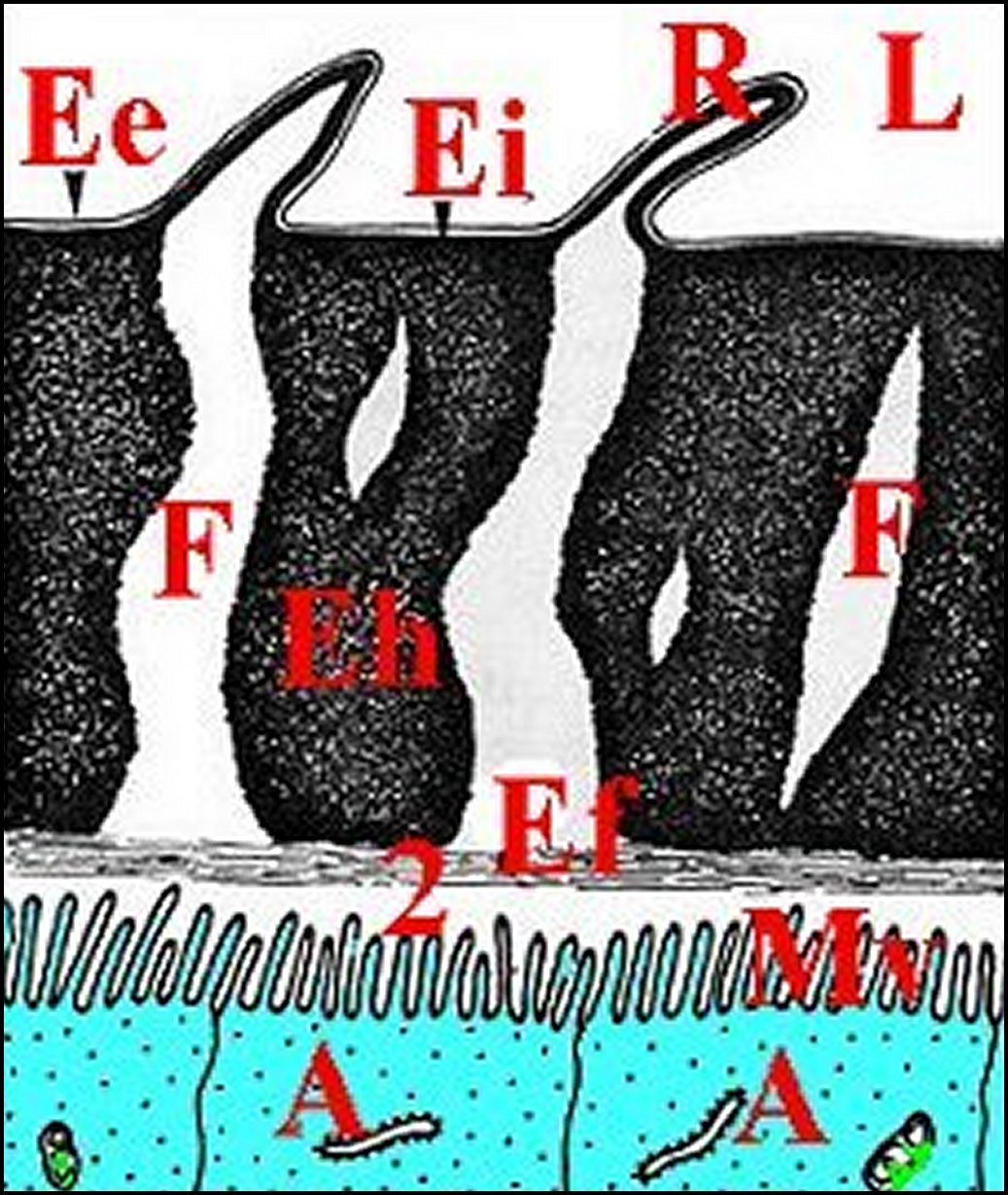 Paroi du tube séminifère en coupe schématisée montrant la cuticule, la chambre palpaire et l'épithélium chez Zosis et Araniella.